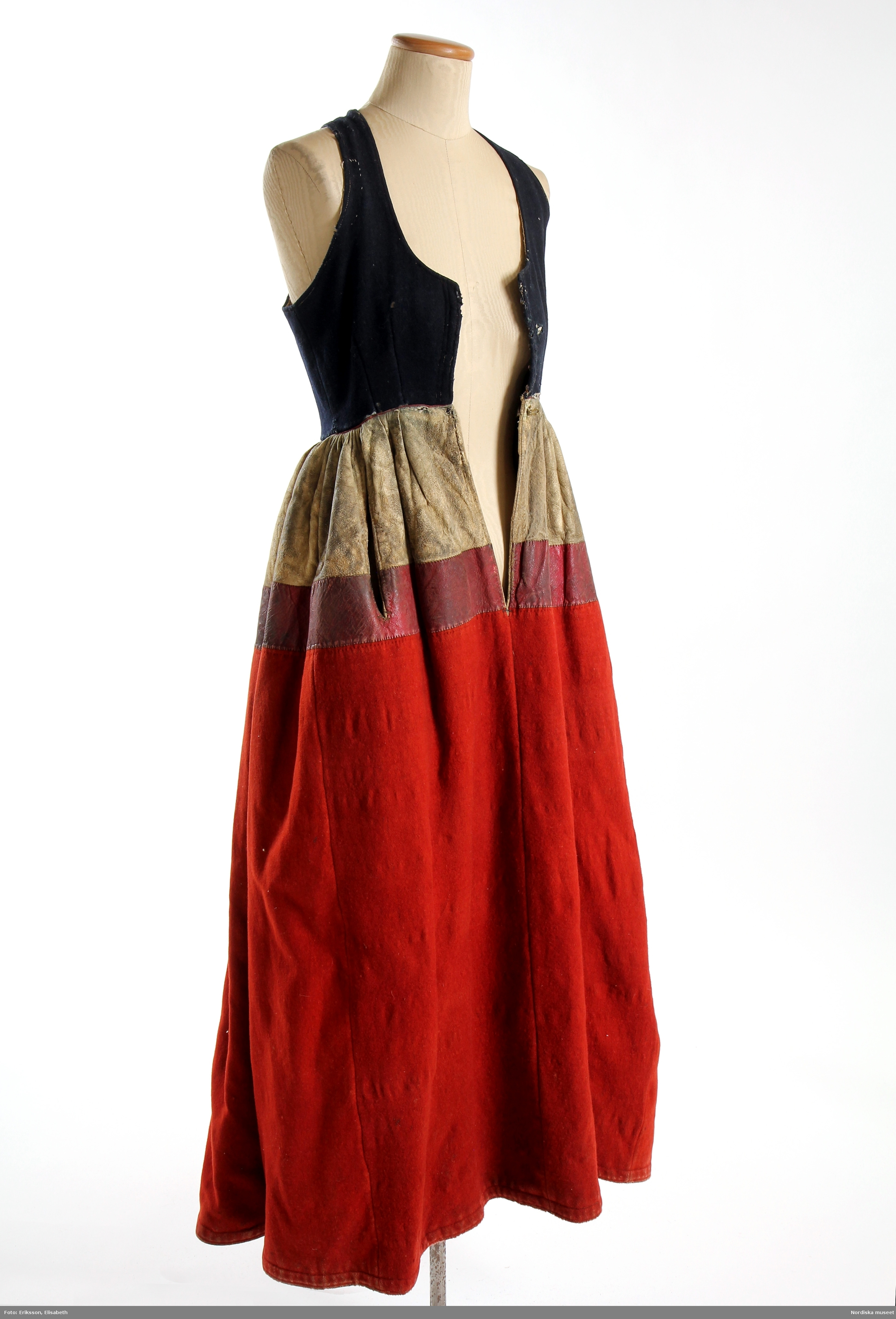 Livkjol, s.k. päls eller skinnklocka. Röd kjol, där övre delen består av vitt skinn 16 cm ned med täta rynkor i midjan, därefter en rand, 7,5 cm bred, av rött saffianskinn och där nedanför röd vadmal, sydd av 5 våder. Kjolen fodrad upptill med fårskinnspäls och i nedre halvan med oblekt grovt linne. 23 cm sprund mitt fram. Ficköppning i höger sida. Livstycket är av blåsvart tunn vadmal, 2 framstycken med dubbla inprovningar på var sida, 1 ryggstycke. Raka framkanter, knäppning med 5 tätt sittande hakar och hyskor. Livet fodrat med oblekt linnelärft. Kjolen handsydd, livstycket delvis handsytt med maskinsömmar kring kanternat och senare tilkommet . Anm: Livet slitet, en del malskador Se Österlens Folkdräkter, 1999: Christina Lindwall-Nordin: Bredhöftade matronor i tjocka kjolar, sid 56-59. /Berit Eldvik 2012-08-15